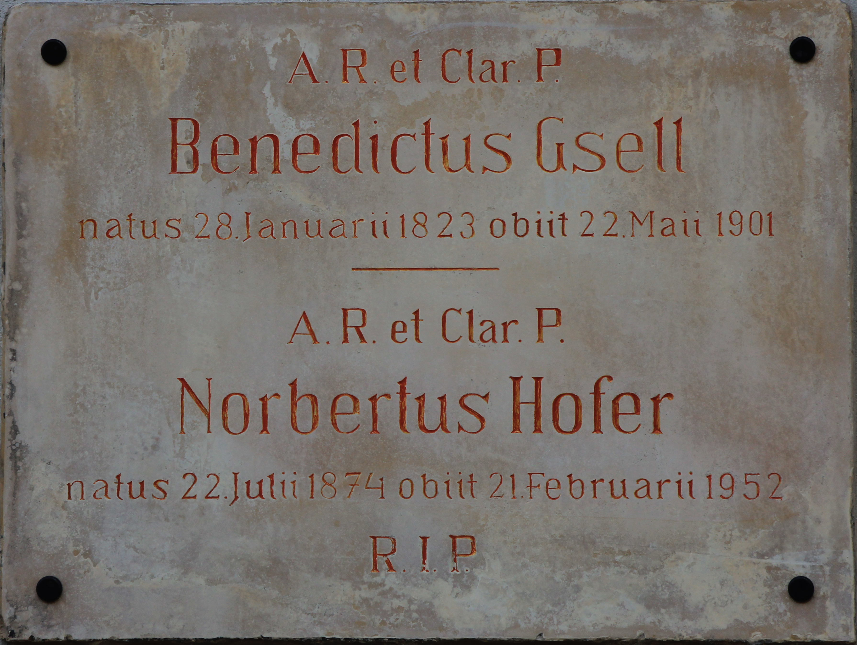 Die Grabtafel des Zisterzienser Norbert Hofer am Ortsfriedhof in Heiligenkreuz, Niederösterreich.